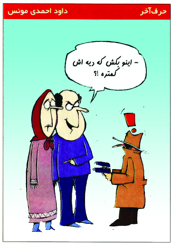 چاپ شده در تاریخ 17 فروردین 1378 در روزنامه زن چاپ تهران.